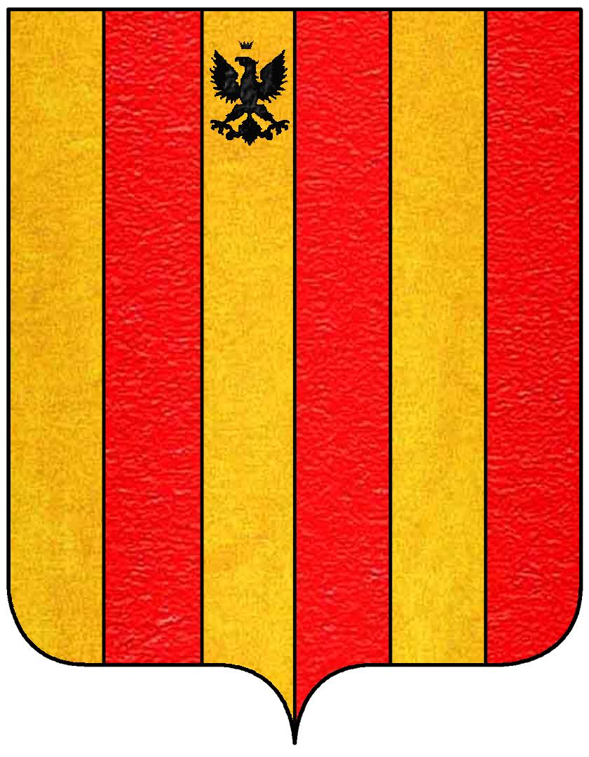 Stemma della famiglia Scotti